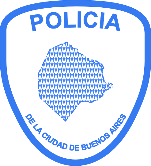 Emblema de la Policía de la Ciudad de Buenos Aires.